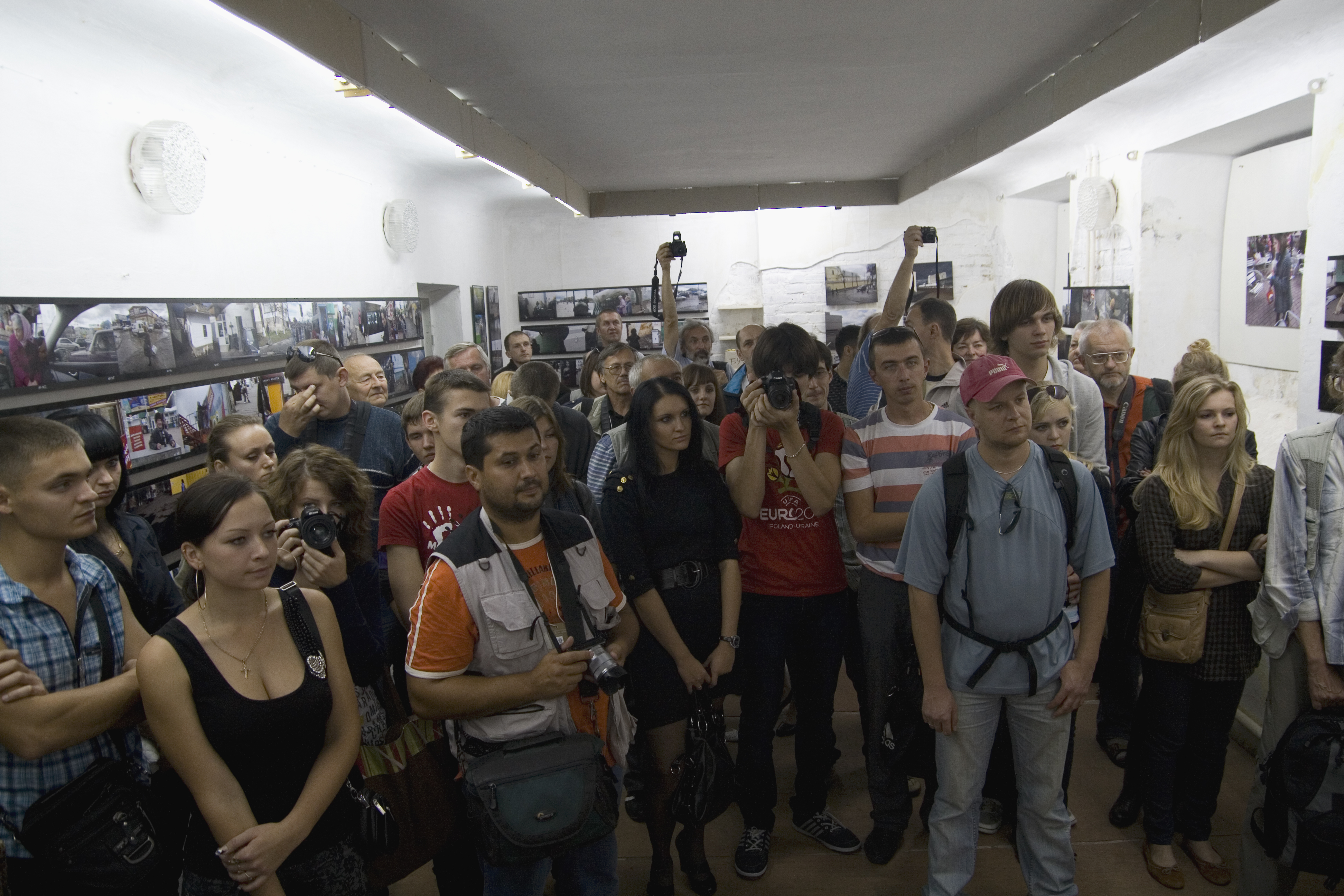 Відкриття виставки проекту "Вихід" у фотоклубі "Обрій"